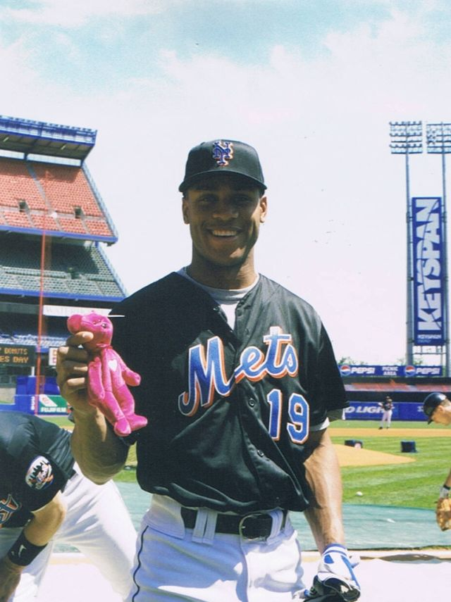 Roger Cedeño